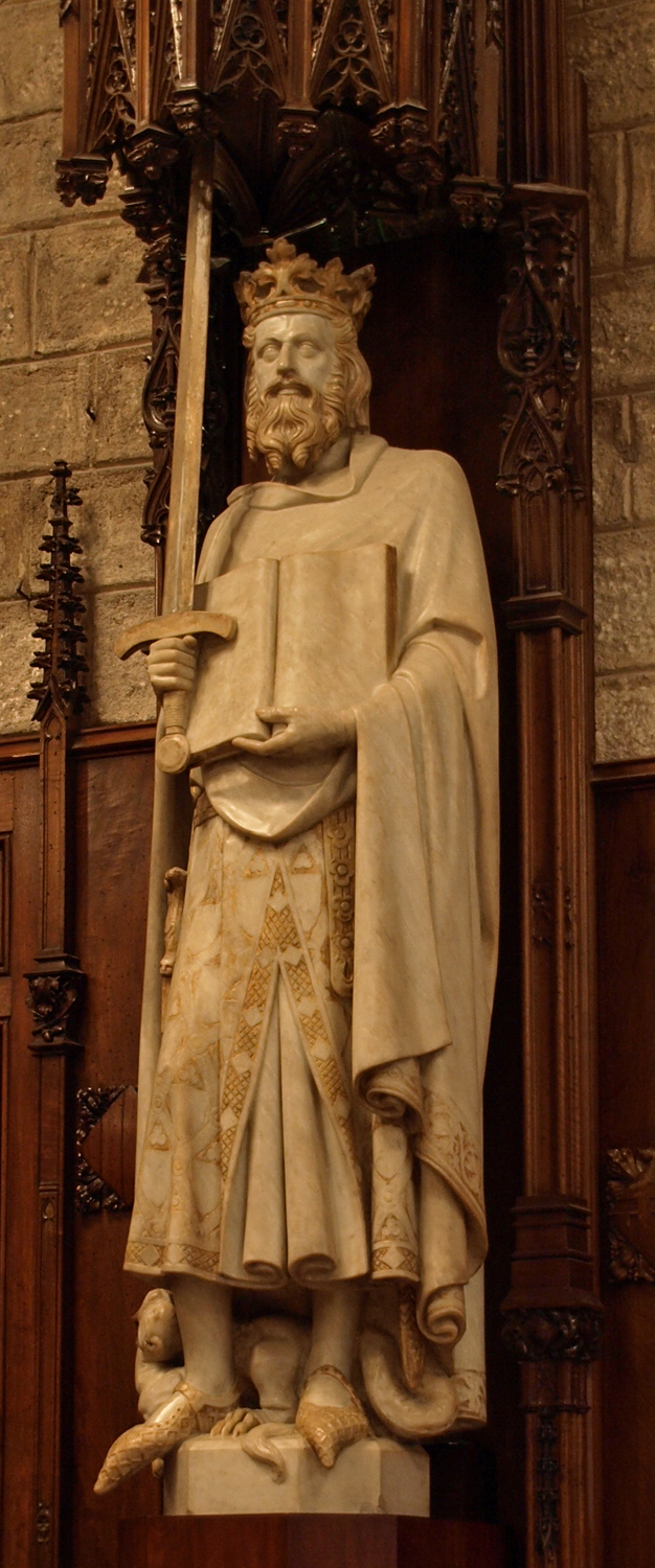 Saló de Cent (Ajuntament de Barcelona)